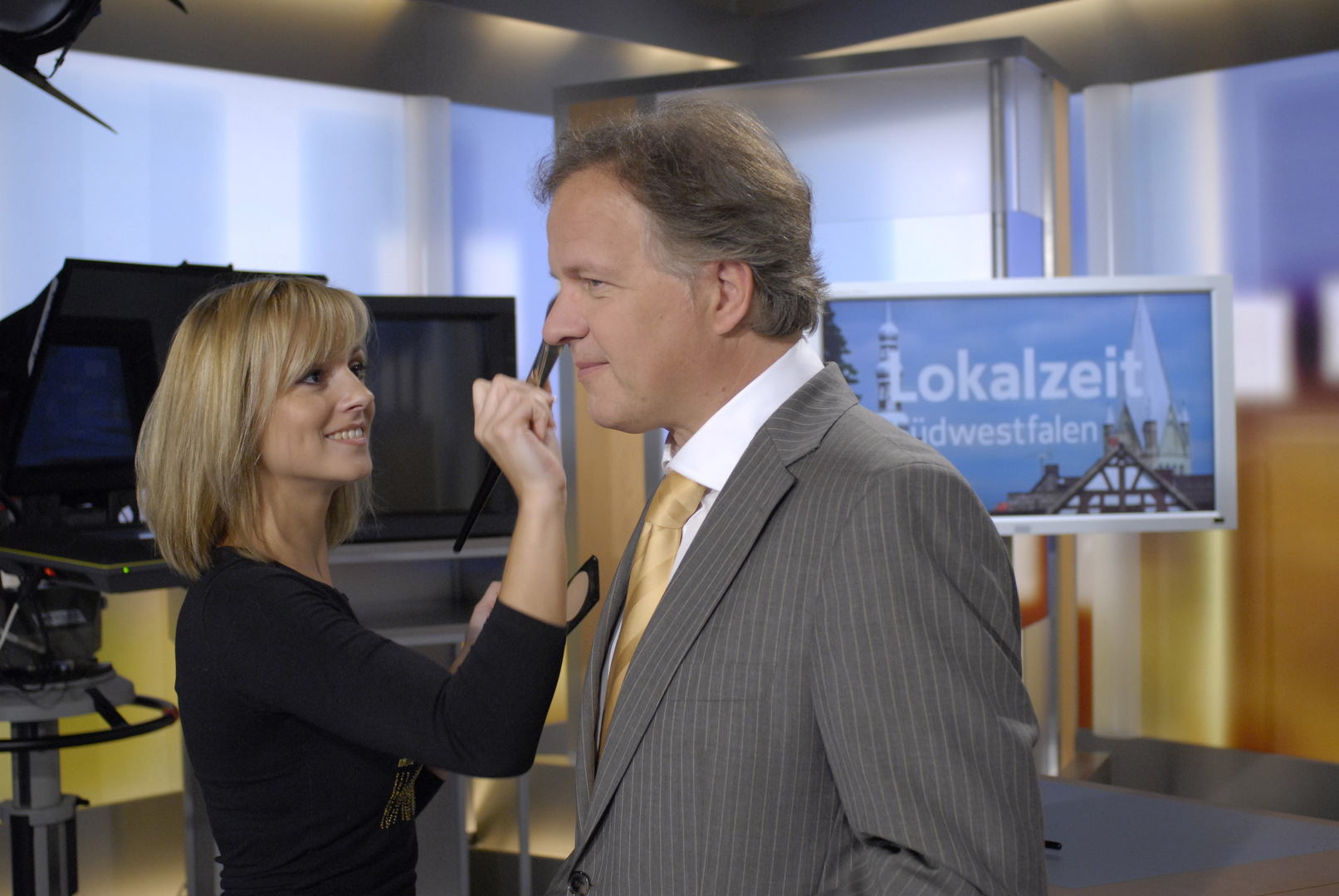 Dirk Glaser moderierte vierzehn Jahre die Lokalzeit Südwestfalen im WDR-Fernsehen. Etwa 1500 Mal als Anchorman live im Studio.